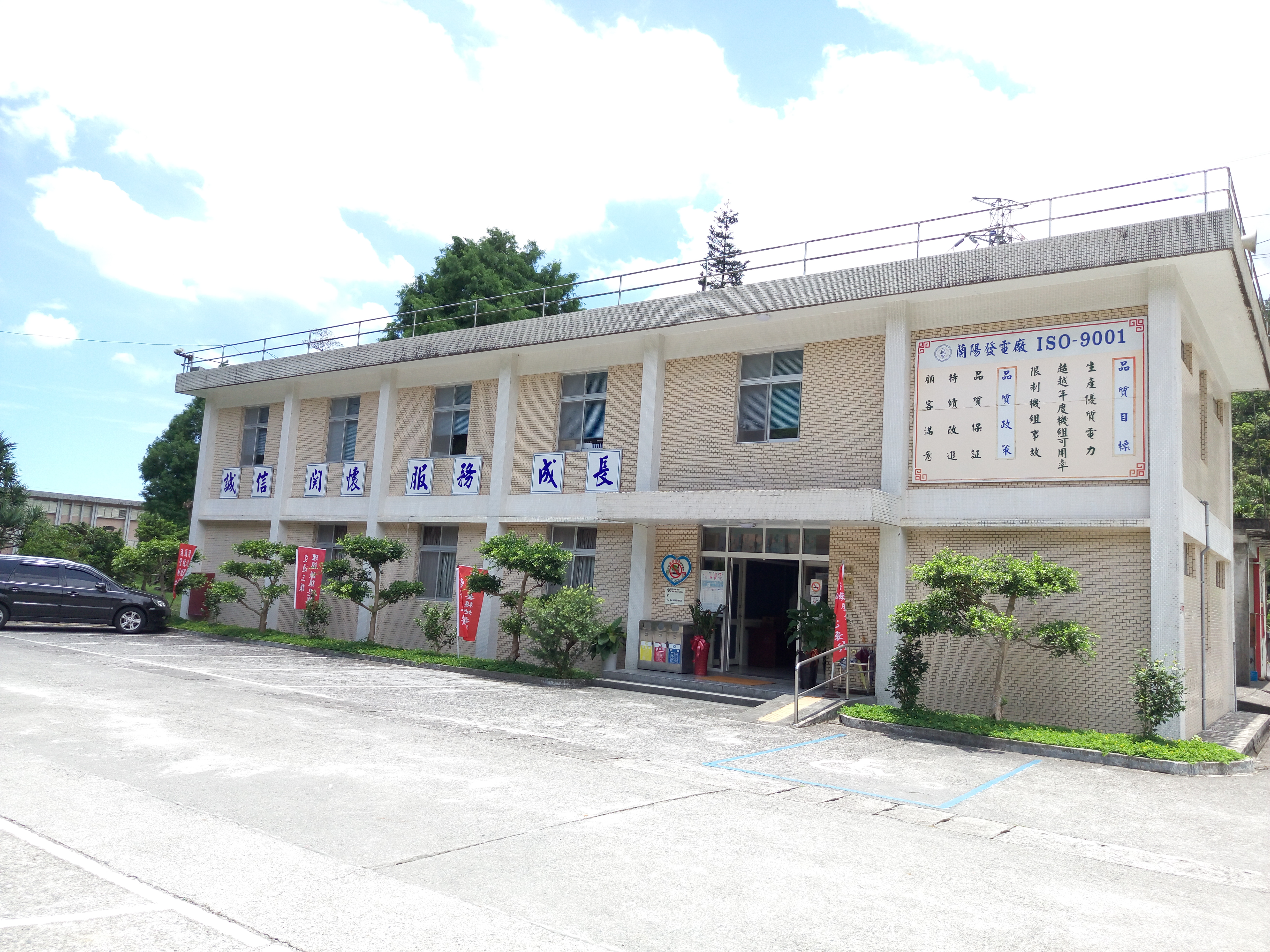 蘭陽發電廠廠本部辦公廳